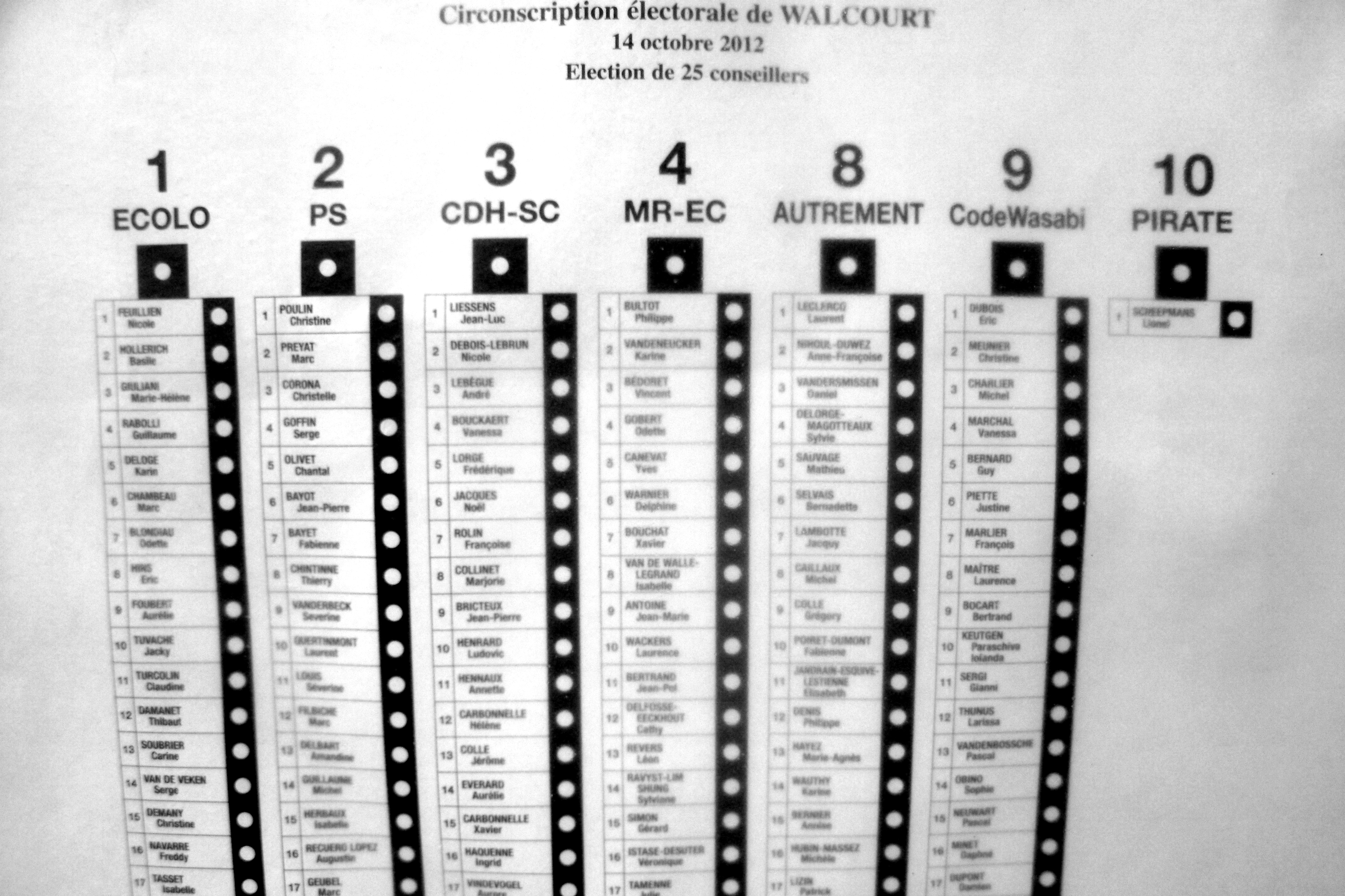 Photo du bulletin de vote au élections communales de Walcourt en Belgique